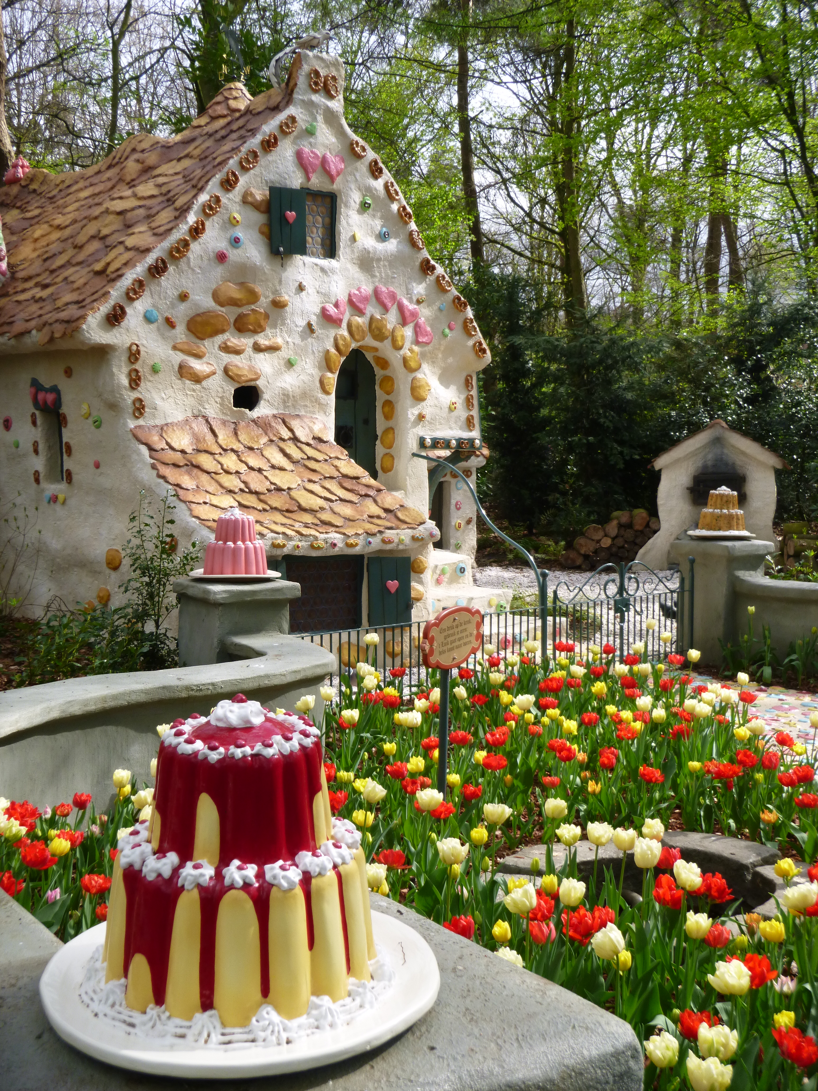 Hansel et Gretel 2017